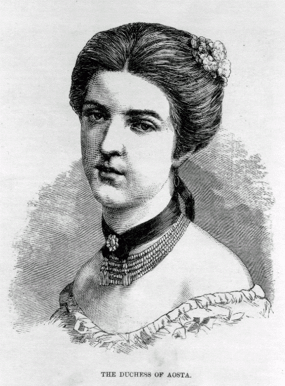 Maria Victoria dal Pozzo della Cisterna, echtgenote van Amadeus van Spanje - Canadian Illustrated News, Vol. III, No. 5, Page 76.